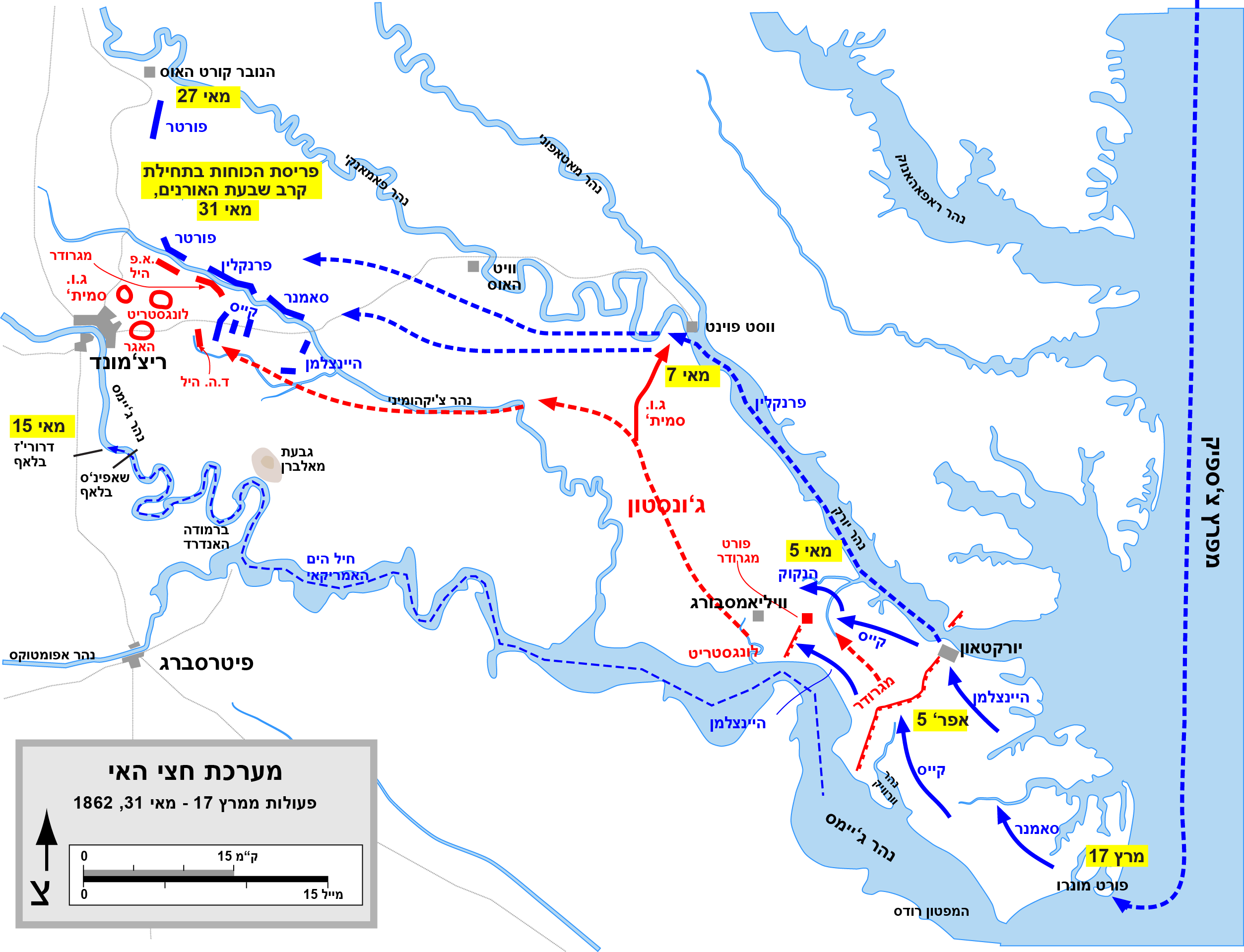 Map of the Peninsula Campaign of the American Civil War. Drawn in Adobe Illustrator CS5 by Hal Jespersen. Graphic source file is available at